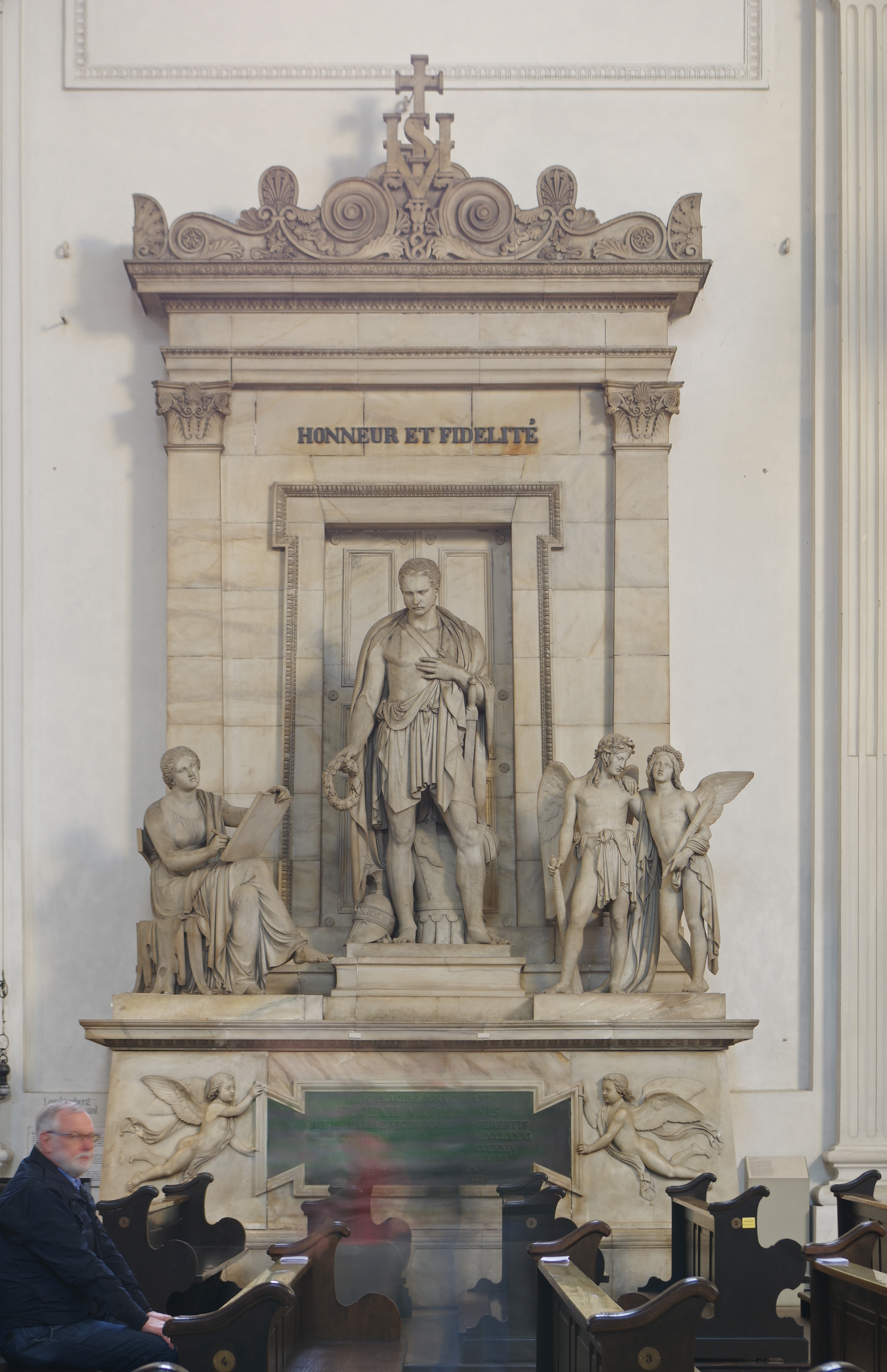 München,Neuhauser Straße 6, Jesuitenkirche St. Michael, Akten-Nr. D-1-62-000-4718